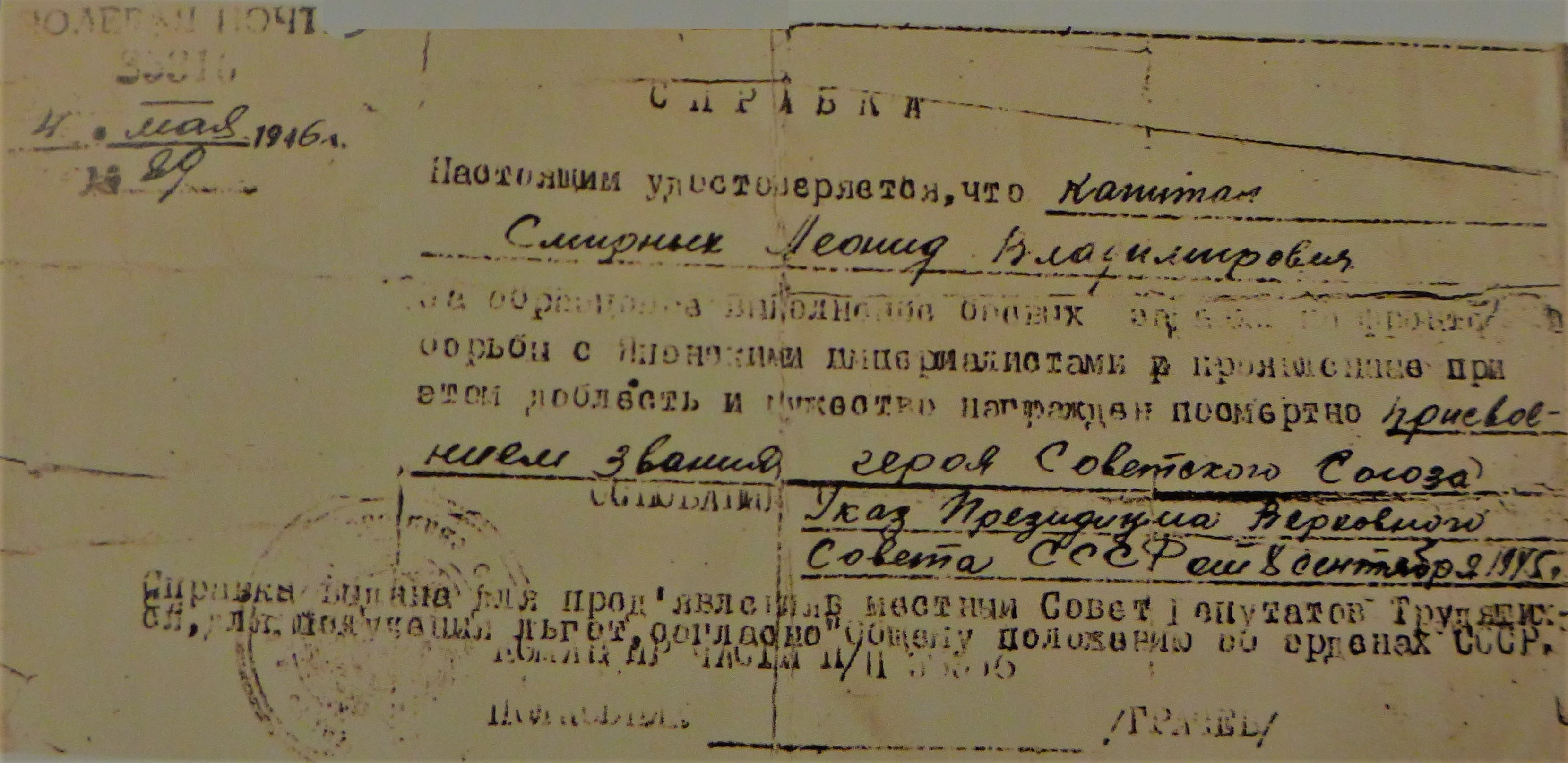 Справка о посмертном присвоении Героя СССР Леониду Владимировичу Смирных 4 мая 1946 года